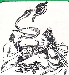 Saints of India, taught the Tamils to find God within their-self, not in temples, through his lyric poems in Tamil. A book by name “theiva Alai”, author Sengai Pothuvan, published in 2007.